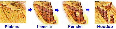 Entstehung von Hoodoos